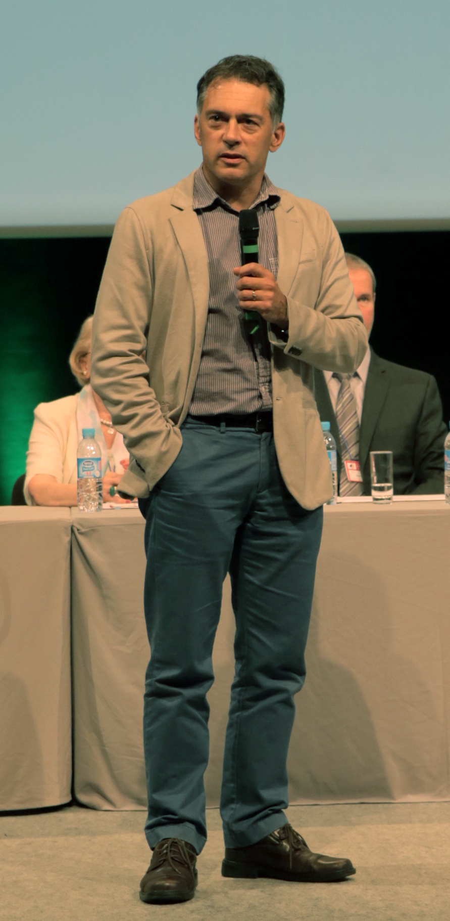 Mark Fettes, Prezidanto de UEA, dum sia parolado en la Solena Fermo de la 100-a Universala Kongreso de Esperanto, Lillo (Francio), 2015.